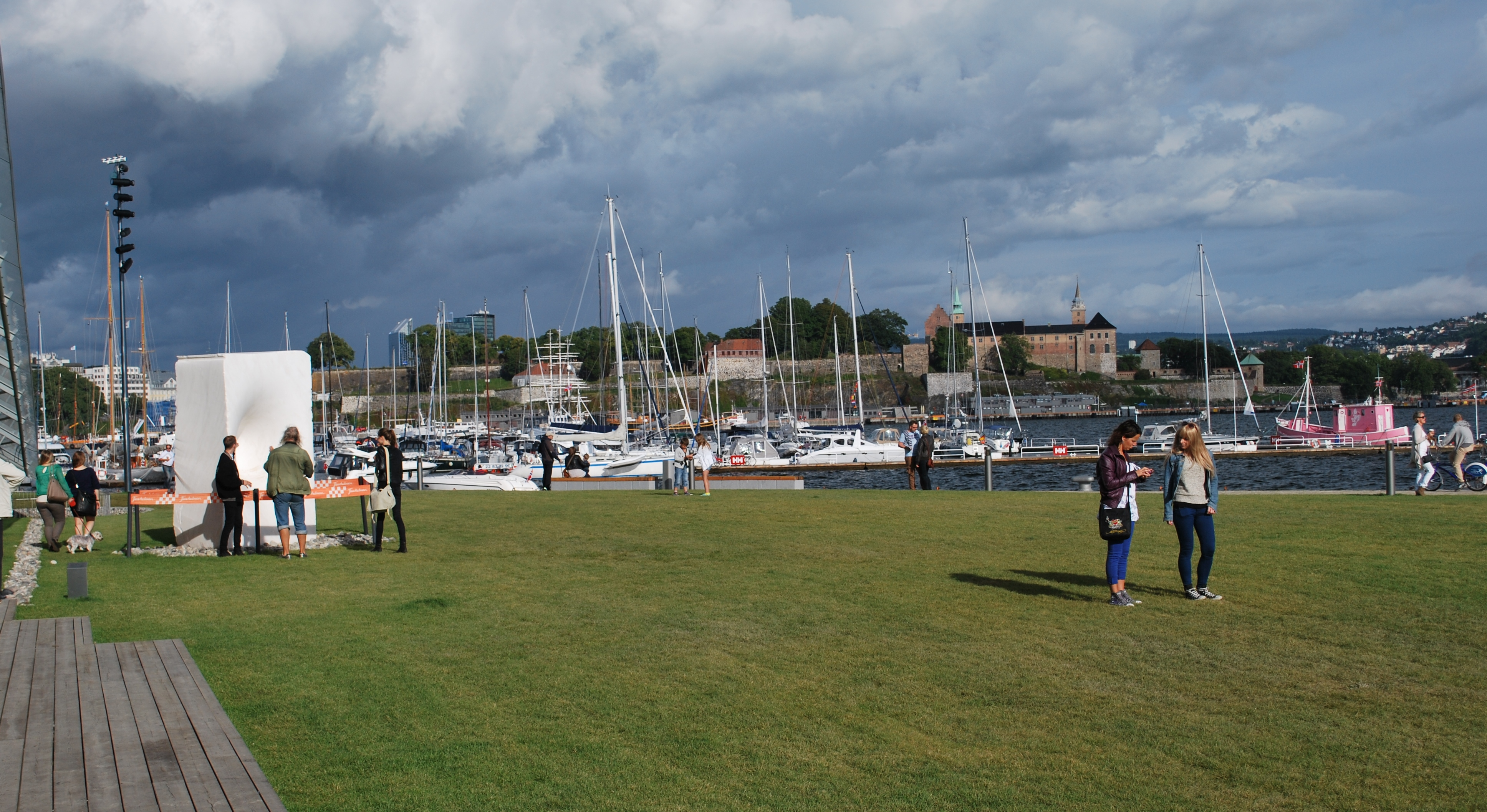 Skulpturparken på Skjæret, nordlige del, Tjuvholmen, Oslo, med Akershus festning i bakgrunnen